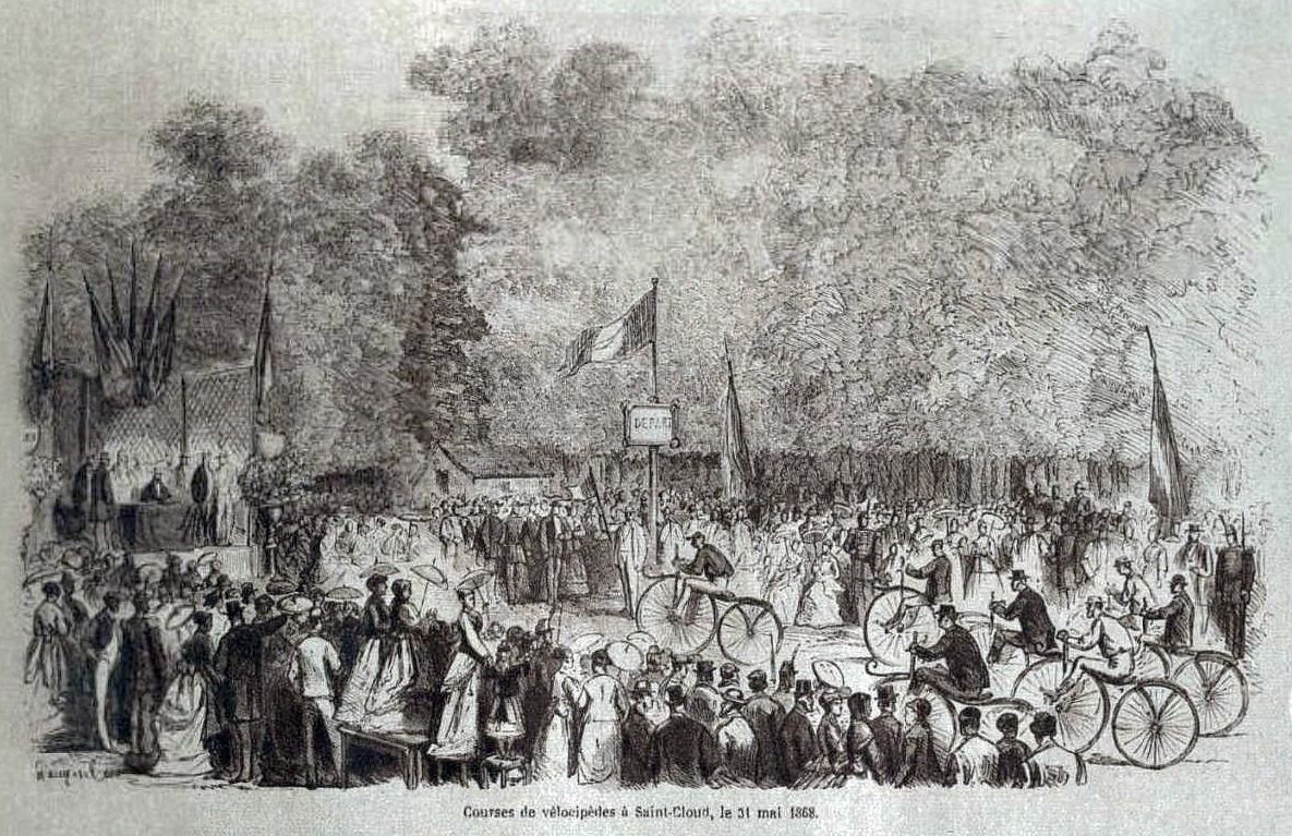 La première course de vélocipèdes à Saint-Cloud, le 31 mai 1868 ("L'Illustration" du 6 juin 1868).